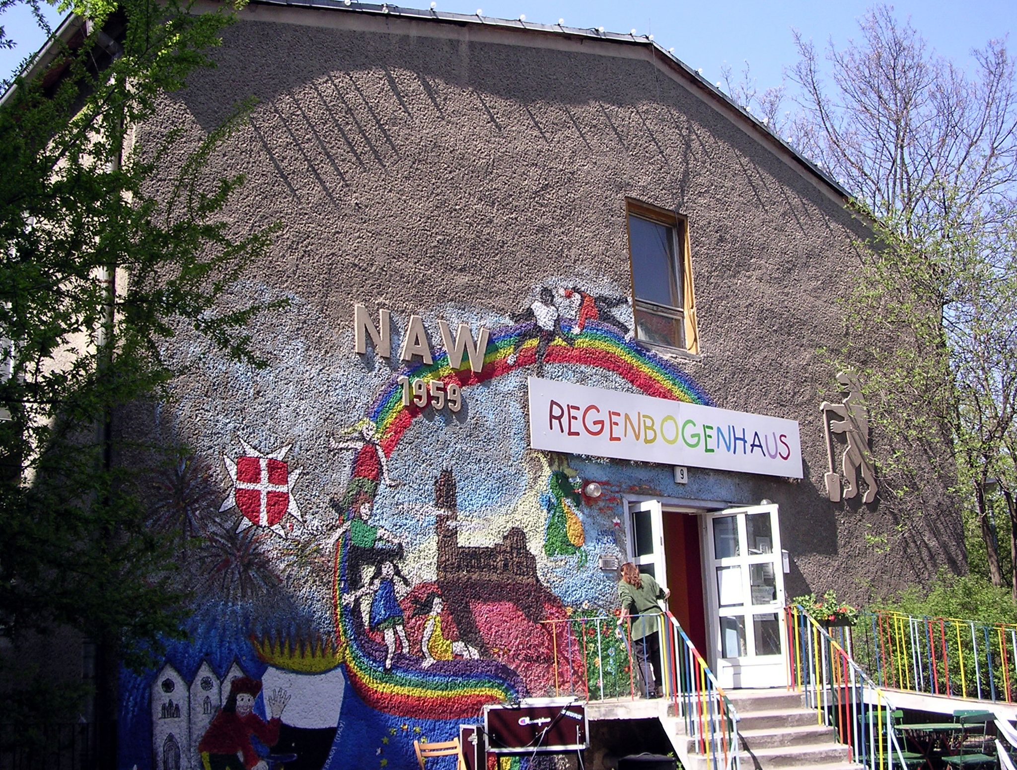 Die Ostfassade des Regenbogenhauses (Kadiner Straße 9) erinnerte bis zur Umgestaltung 2006 an die Entstehungszeit des Hauses, das 1959-1961 im Rahmen des Nationalen Aufbauwerks errichtet wurde. Der Bär mit dem Spaten (Symbol des NAW) und die Buchstaben NAW mit der Jahreszahl 1959 darunter (Jahr der Grundsteinlegung) verschwanden erst 2006. Die auf dem Bild erkennbare Bemalung entstand 2003 im Rahmen eines europäischen Workcamps. Die Teilnehmer malten Motive aus ihren Heimatländern.